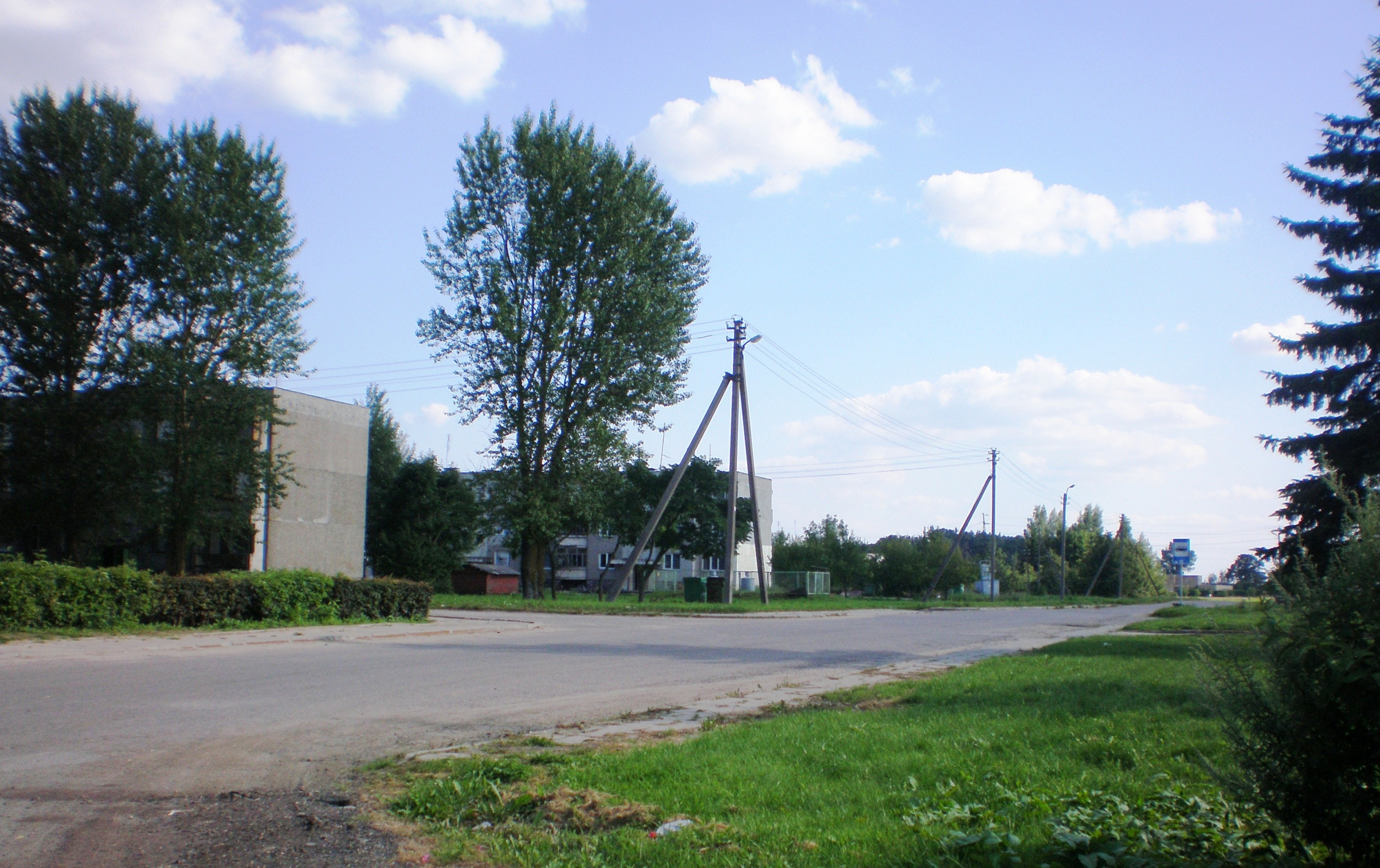 Kunioniai, Kėdainių raj.